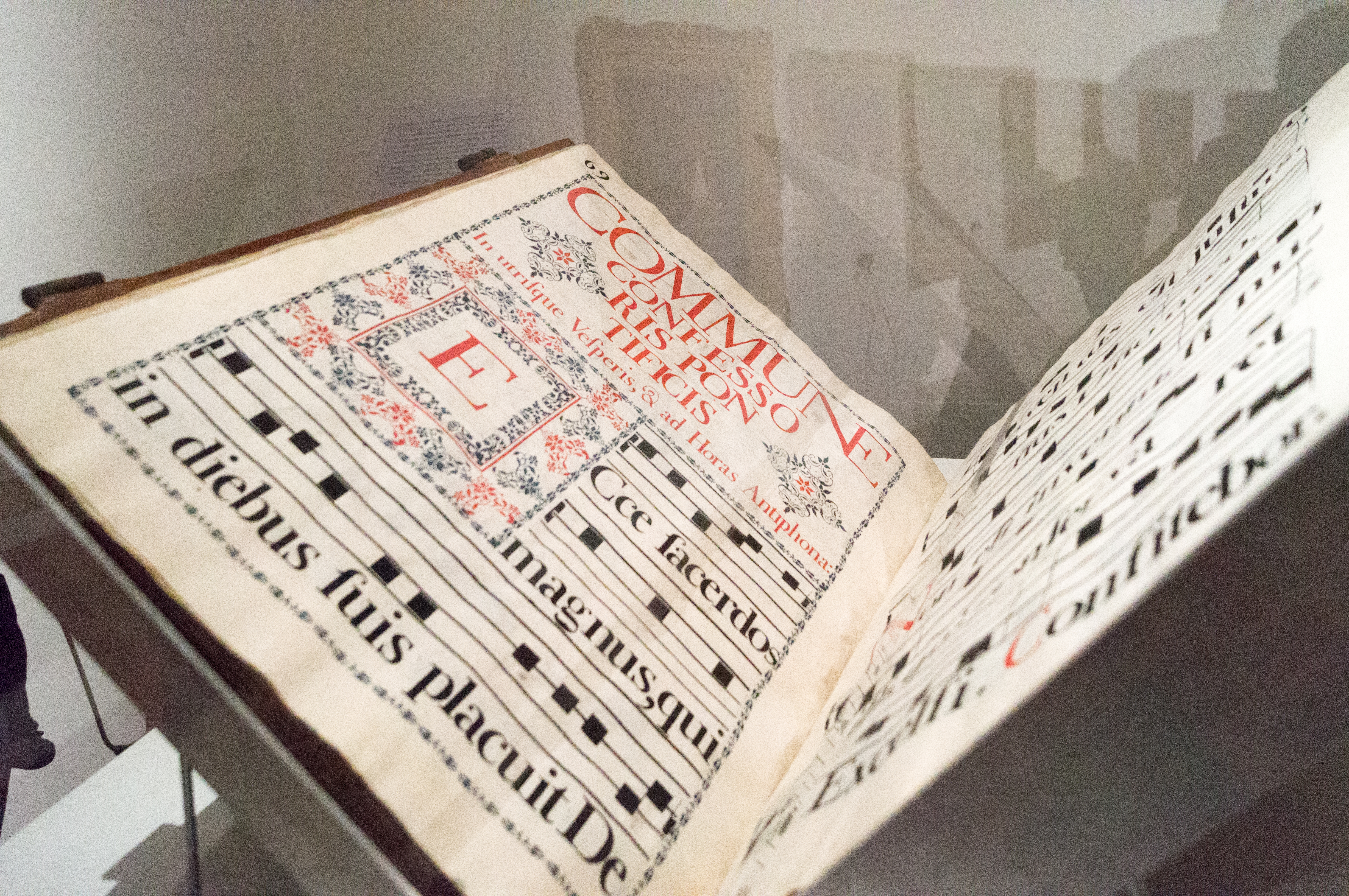 Libro para que recopila cantos gregorianos, el gran formato permitía que todo el coro pudiese ver la letra y la partitura en tetragrama.